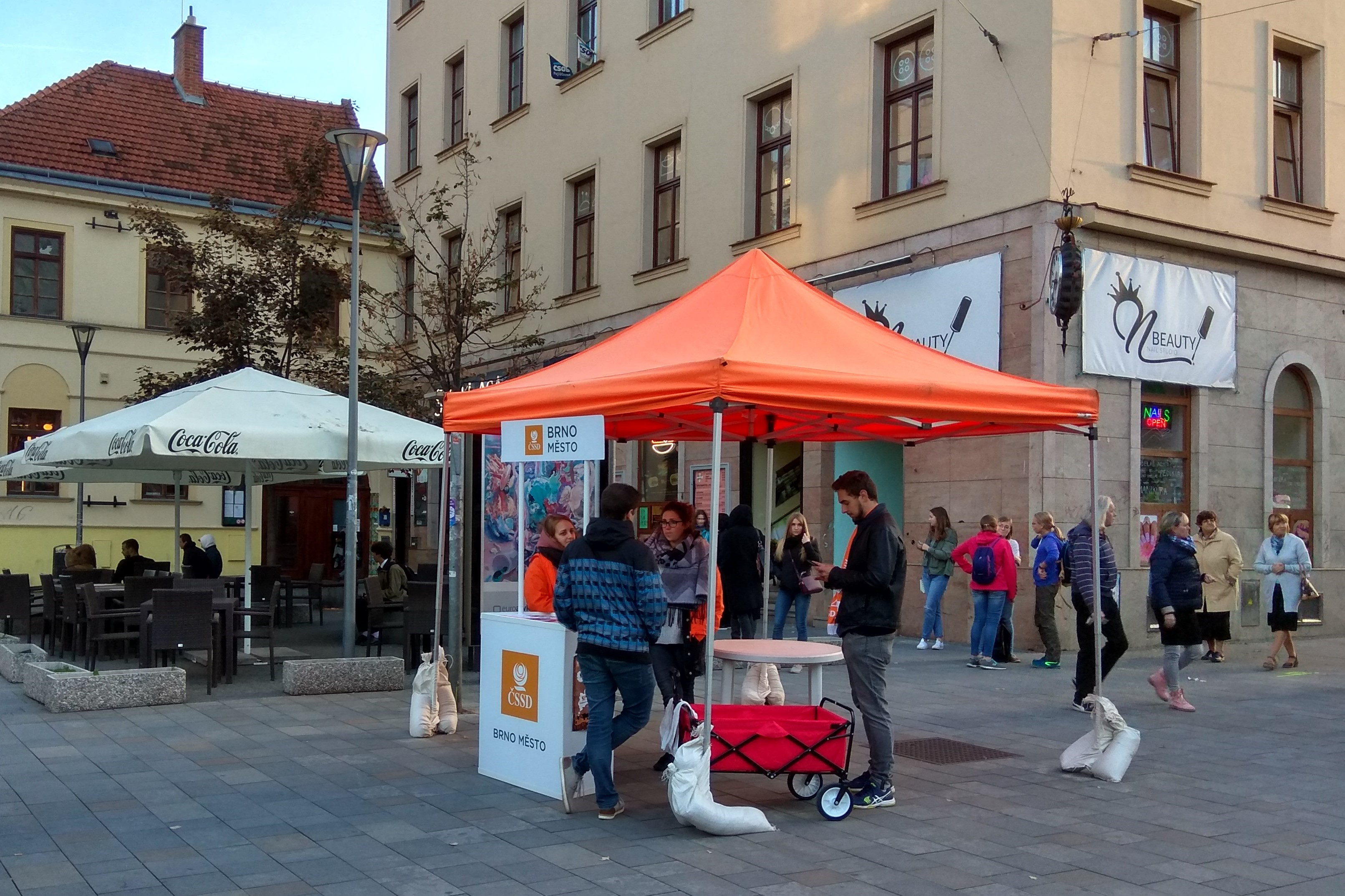 Předvolební stránek České strany sociálně demokratické v Brně před komunálními (a senátními) volbami v říjnu 2018.